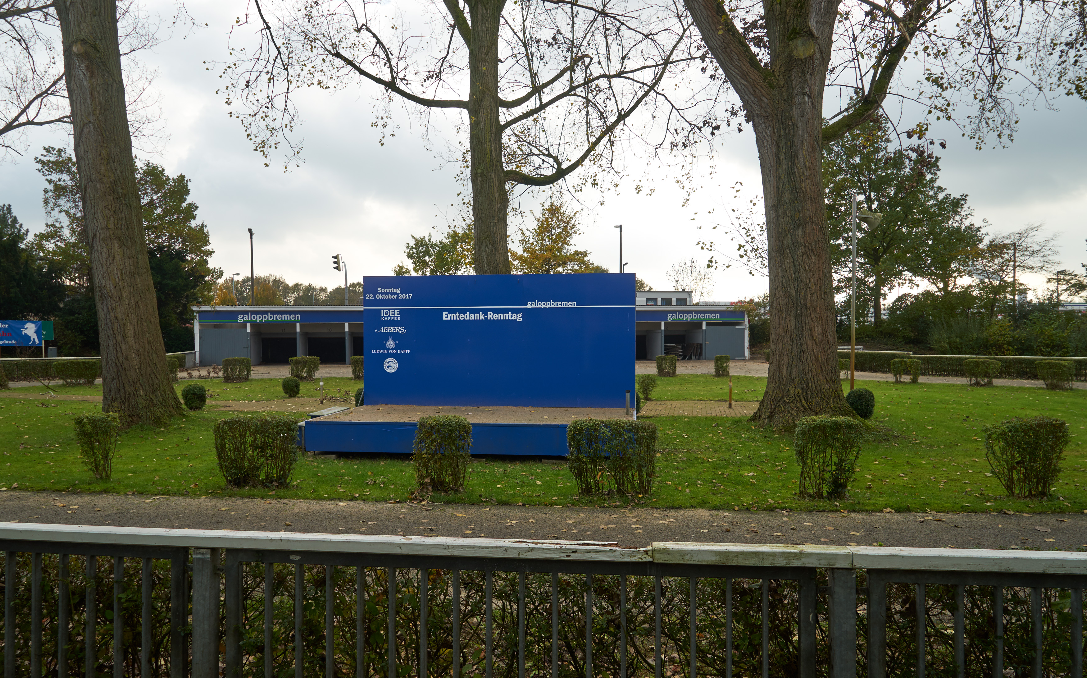 Galopprennbahn Bremen. Führring